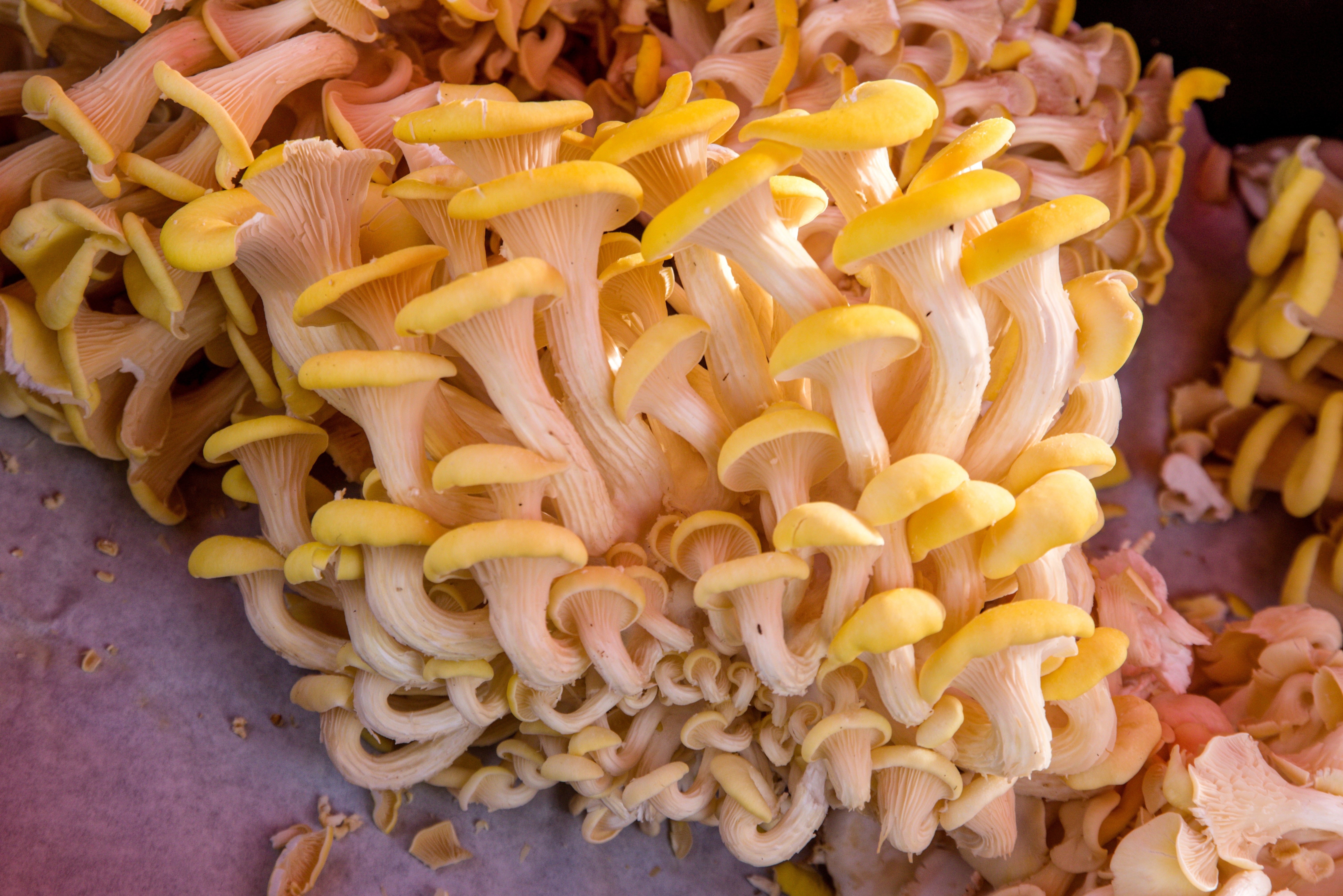 Bilder aus Freiburg